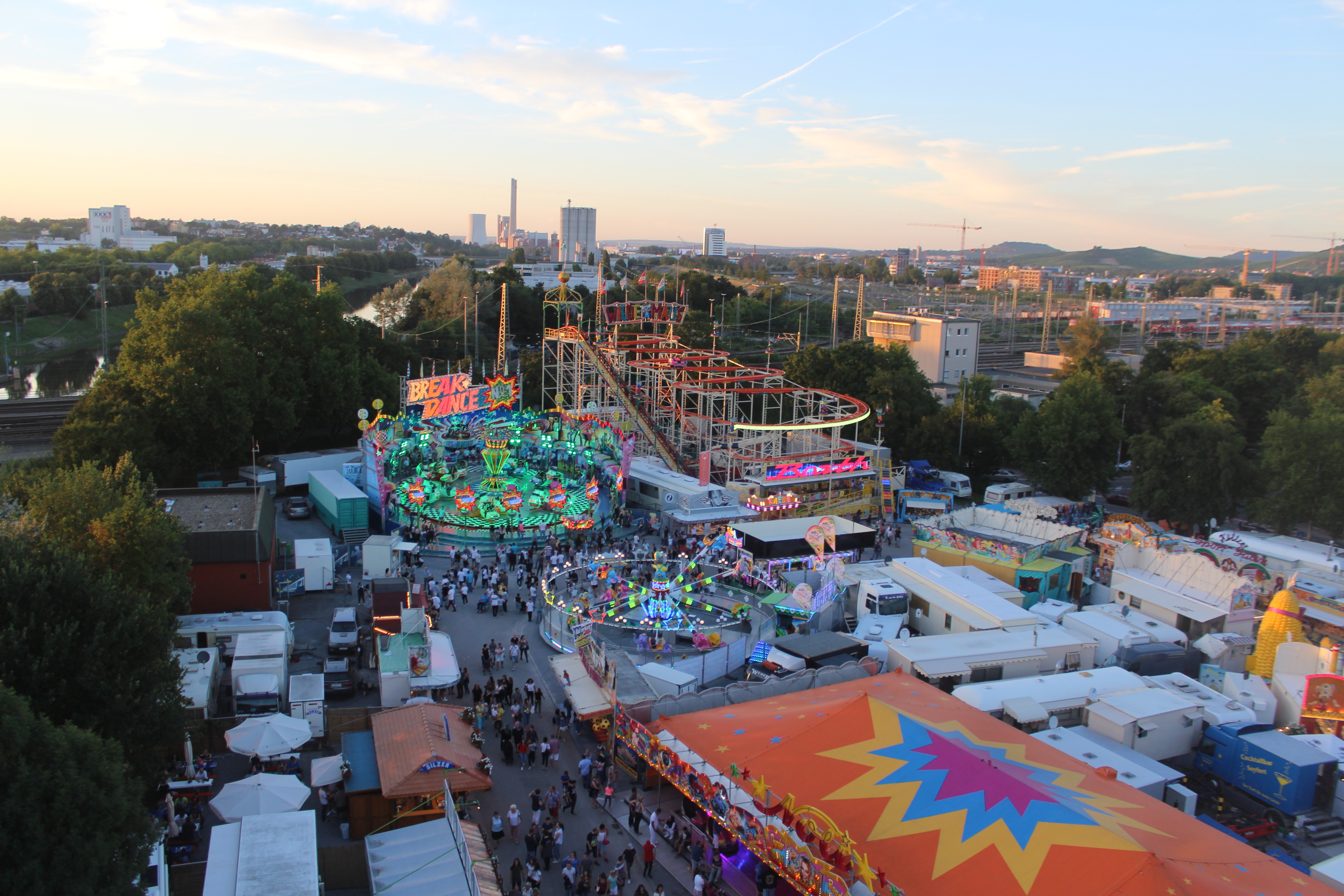 Unterländer Volksfest 2017, fotografiert vom Riesenrad